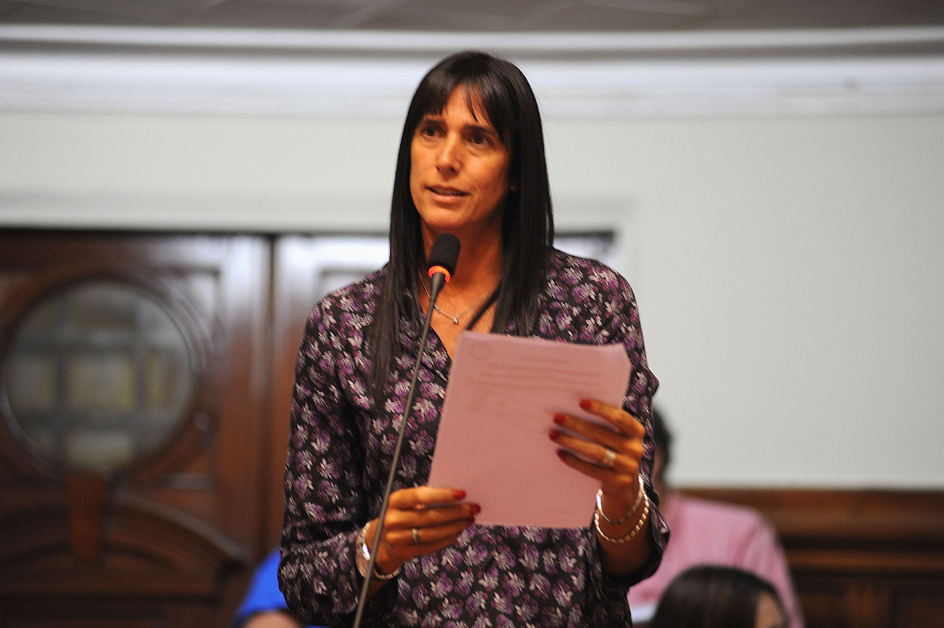 La parlamentaria Gabriela Pérez Del Solar, durante la sesión vespertina efectuada por el Pleno, en el cual fijó su posición respecto a uno de los temas en debate.